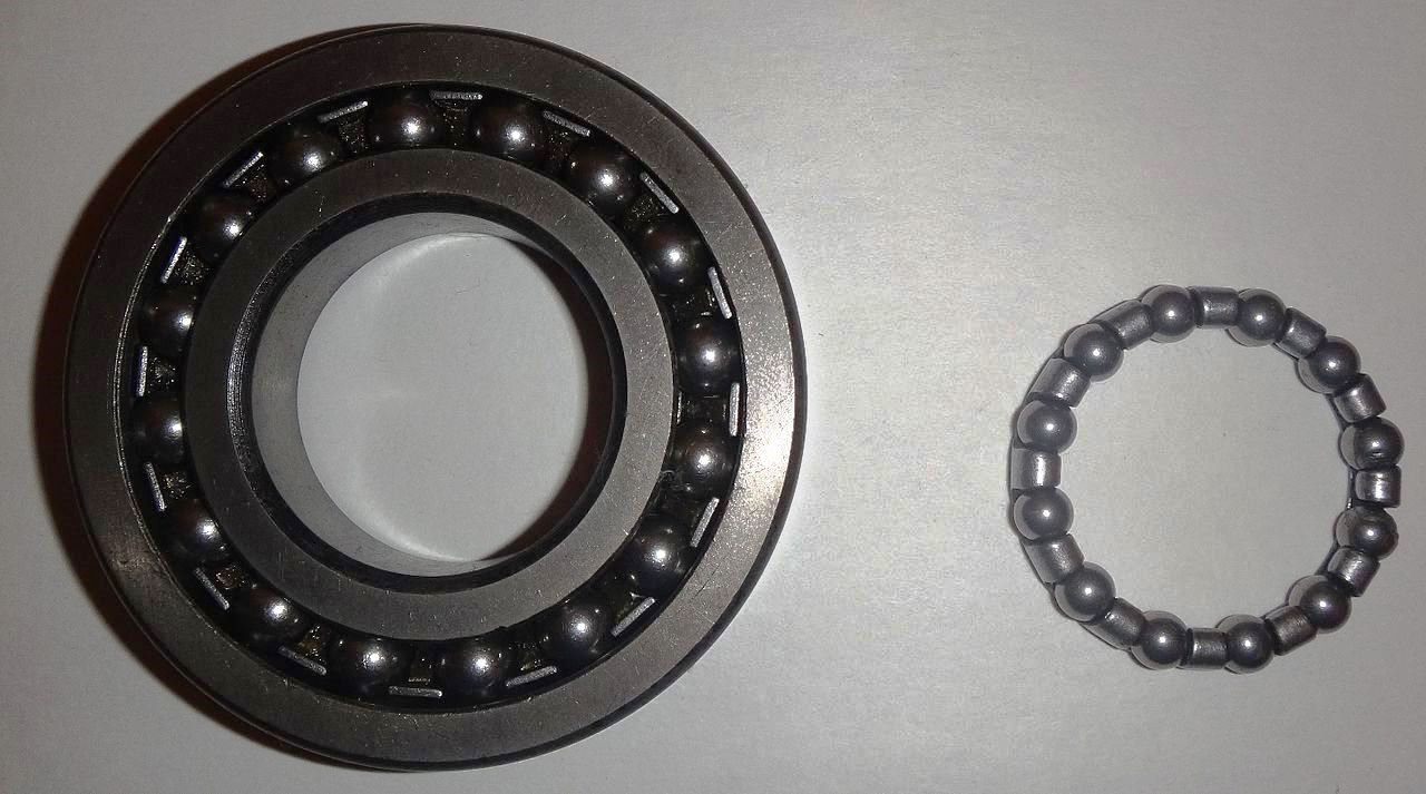 Два вида подшипников качения